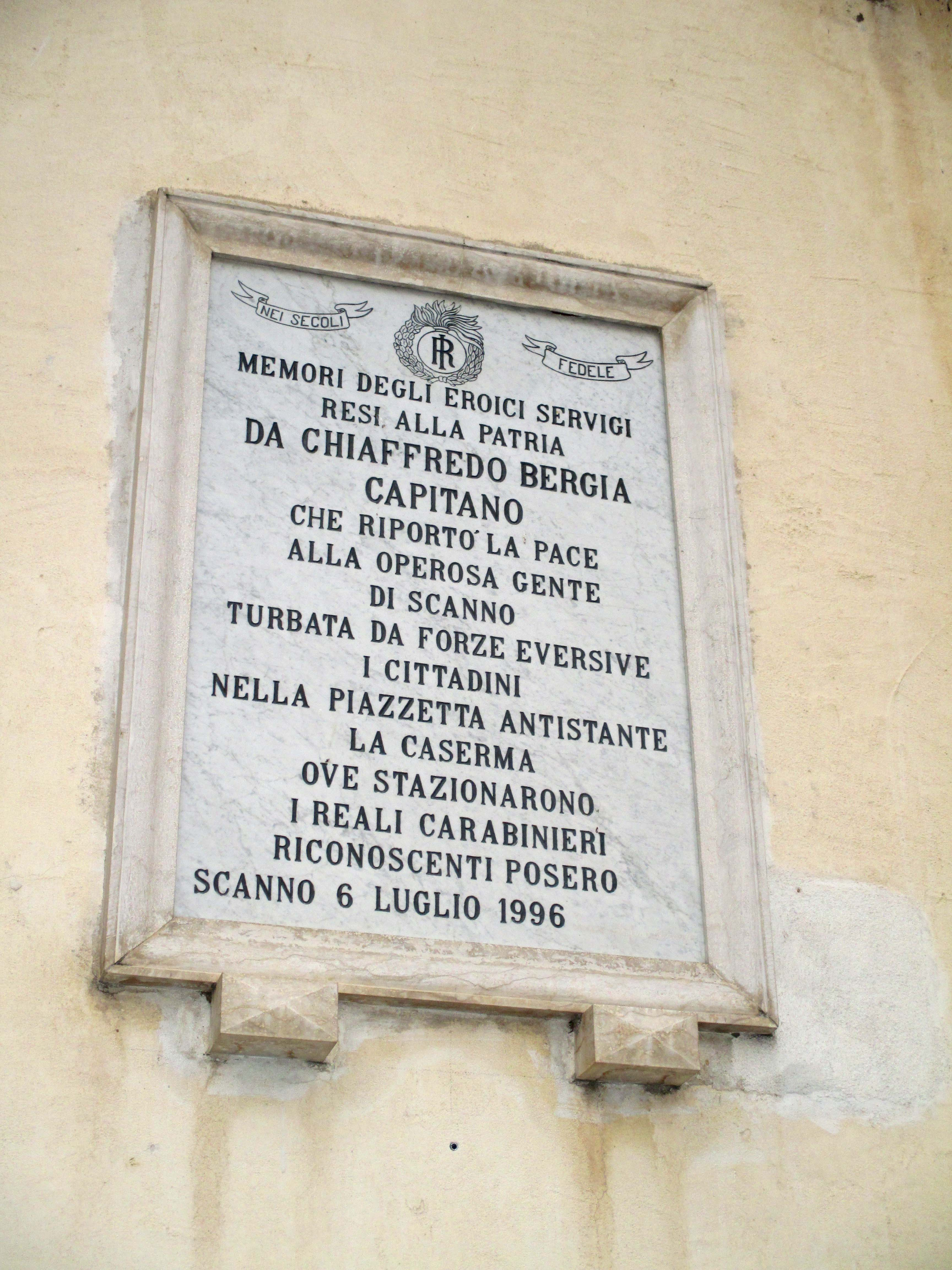 Lapide su Chiaffredo Bergia sita a Largo Chiaffredo Begia a Scanno